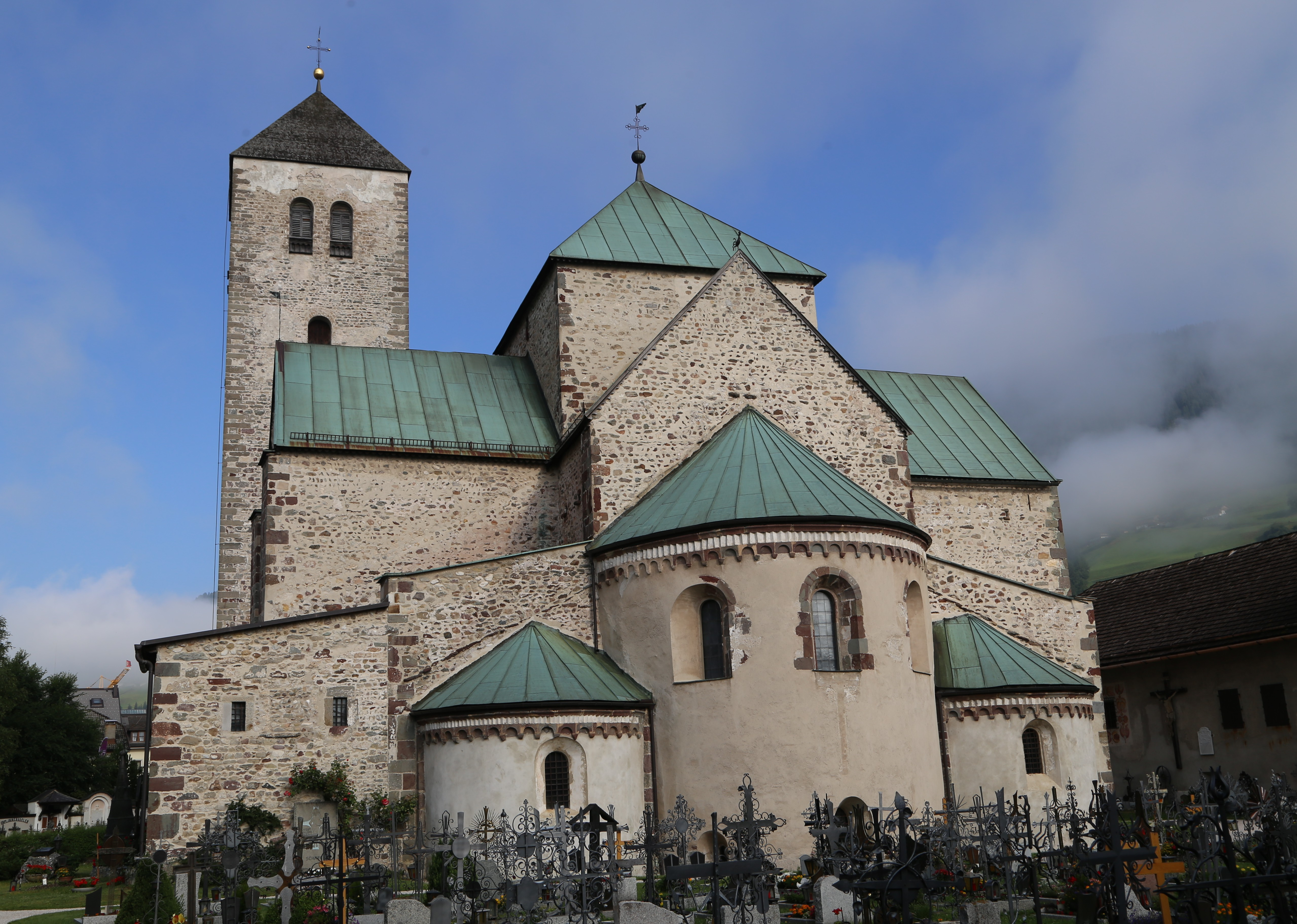 Stiftskirche St. Candidus und St. Korbinian in Innichen Dreischiffige romanische Basilika mit Querschiff, Vierungskuppel und drei Apsiden. Nach dem Brand im Jahre 1200 neu aufgebaut, 1284 geweiht. Krypta mit Säulenreihen 1967 1969 rekonstruiert. Fassa-denturm 1320 1326 aufgeführt, Vorhalle 1469 hinzugebaut. Nothelferkapelle 1524 geweiht. Südportal mit Steinrelief und Fresken von Michael Fächer. Wandgemälde in der Vierungskuppel (Schöpfungsgeschichte) um 1280.